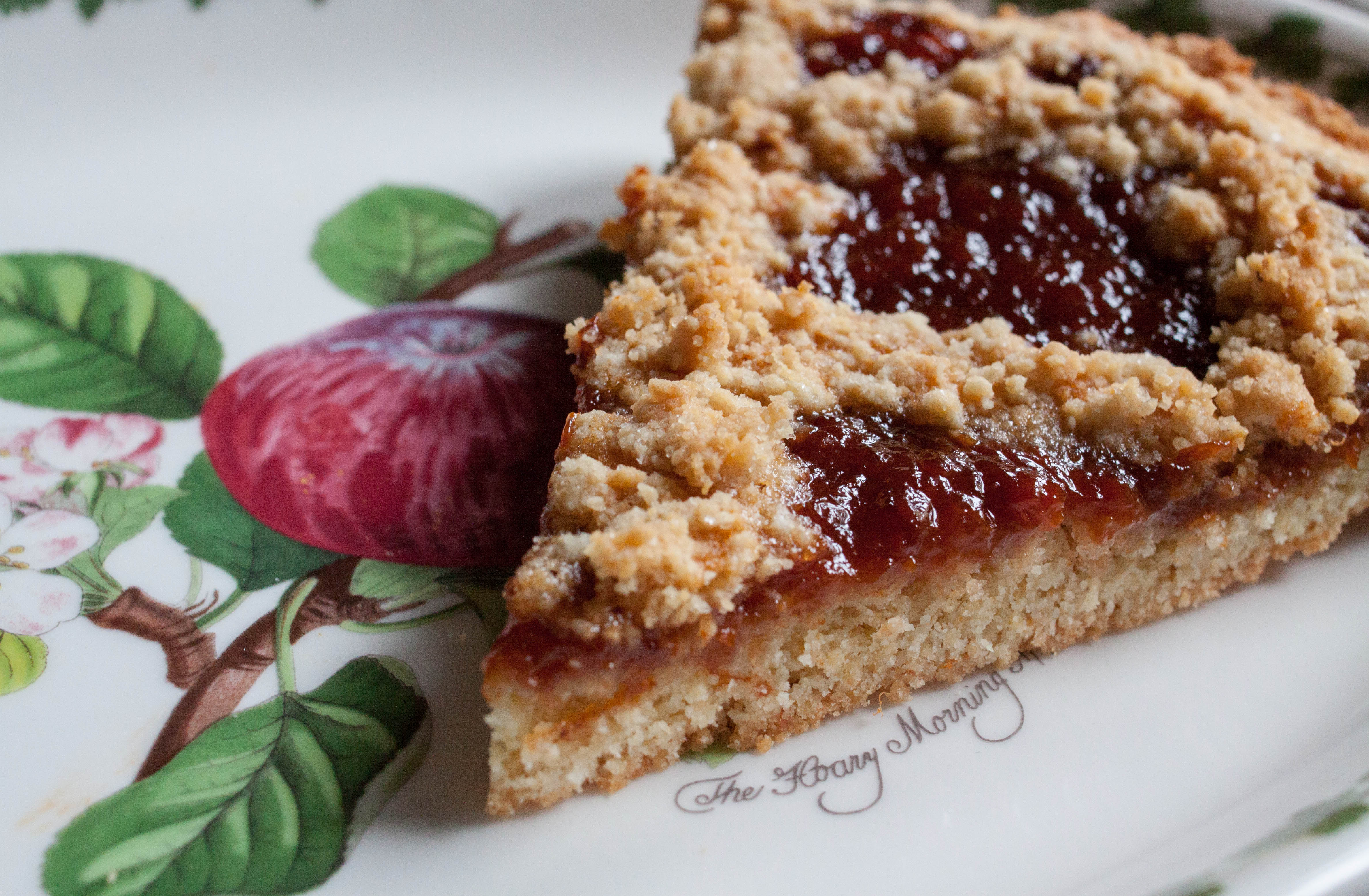 "Crostata di briciole con marmellata di albicocche"